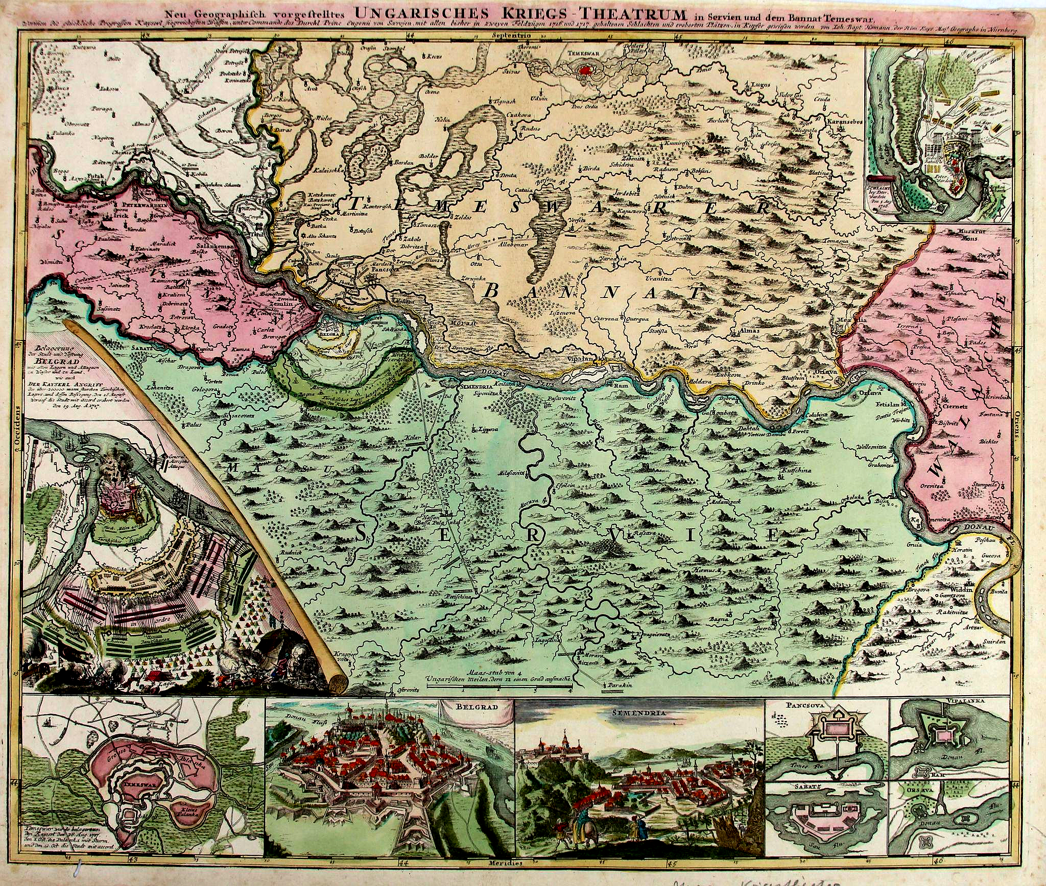 Homann, Johann Baptist: Neu geographisch vorgestelltes Ungarisches Kriegs Theatrum in Servien und dem Bannat, Temeswar, vorinen die glückliche progessen kayserl. siegreichesten Waffen, unter Commando des durchl. Princ. Eugenii von Savoyen, ... Temesi bánság és környéke az 1716-1717. évi hadjáratok idején. - Hadtörténelmi térkép. - Domborzat halmos ábrázolással. - Települések nagyság szerint jellel, névvel. - Hadműveletek bejelölve A karlócai béke (1699) értelmében a Temesi bánság területe változatlanul az Oszmán-török Birodalom fennhatósága alá tartozott. 1716-ban a két császár között a hadiállapot azonban kiújult és a Savoyai Jenő vezette keresztény seregek látványos sikereket értek el: 1716. augusztus 5-én legyőzték Péterváradnál a török fősereget. Október 16-án a császári sereg bevonult Temesvárra, a visszafoglalt Bánság első katonai főparancsnoka Claudius Florimond Mercy tábornagy lett. Több csatát követően a császári seregek 1717. augusztus 22-én bevették Belgrádot. A háborút az 1718-as pozsareváci béke zárta le.